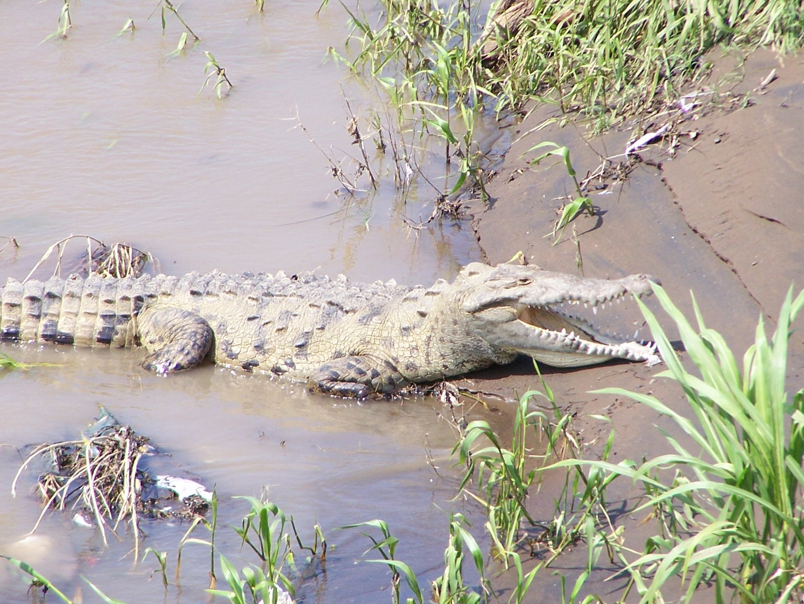 American Crocodile in Rio Tarcoles